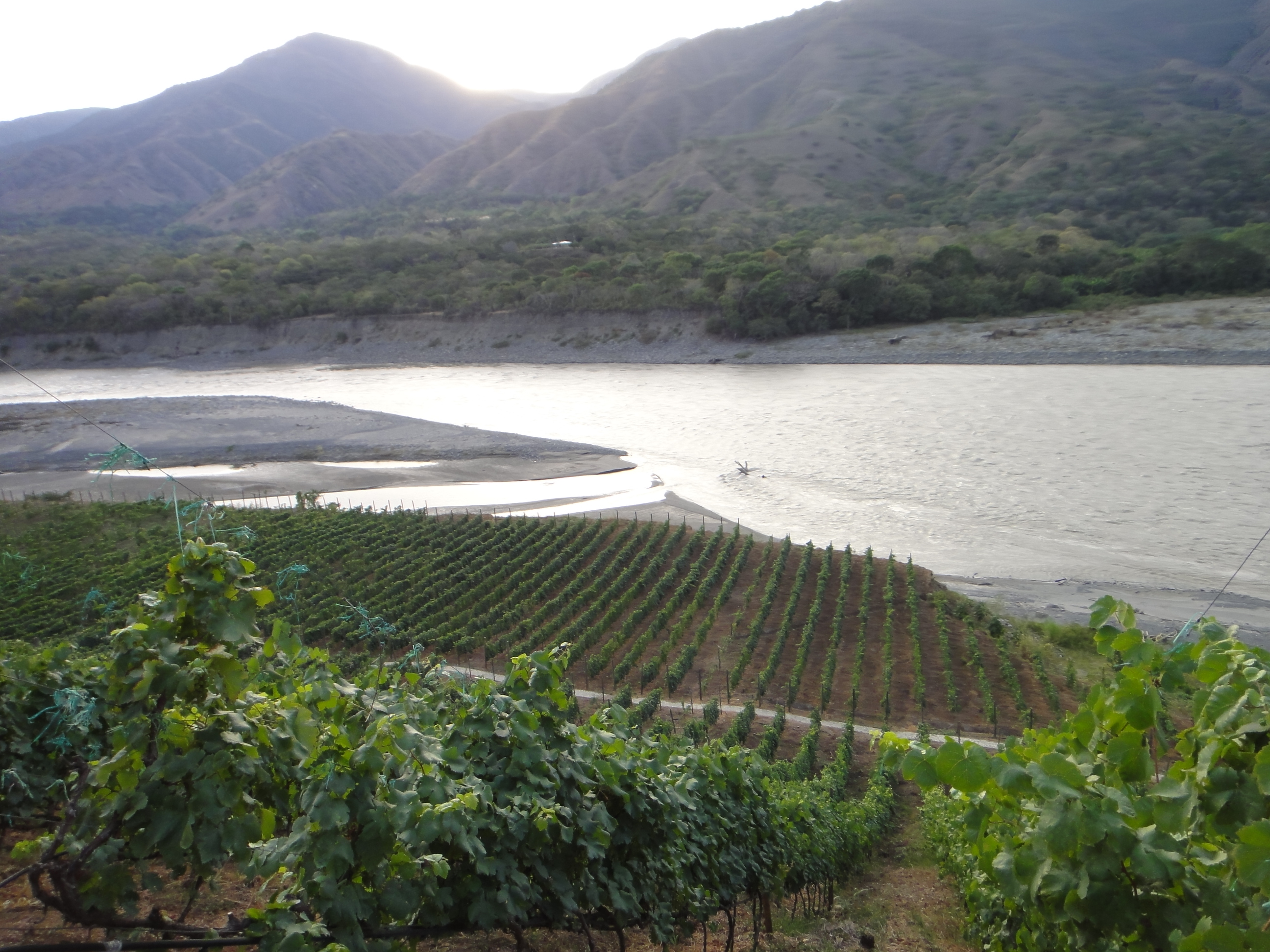 Viña Sicilia. Olaya, Antioquia.